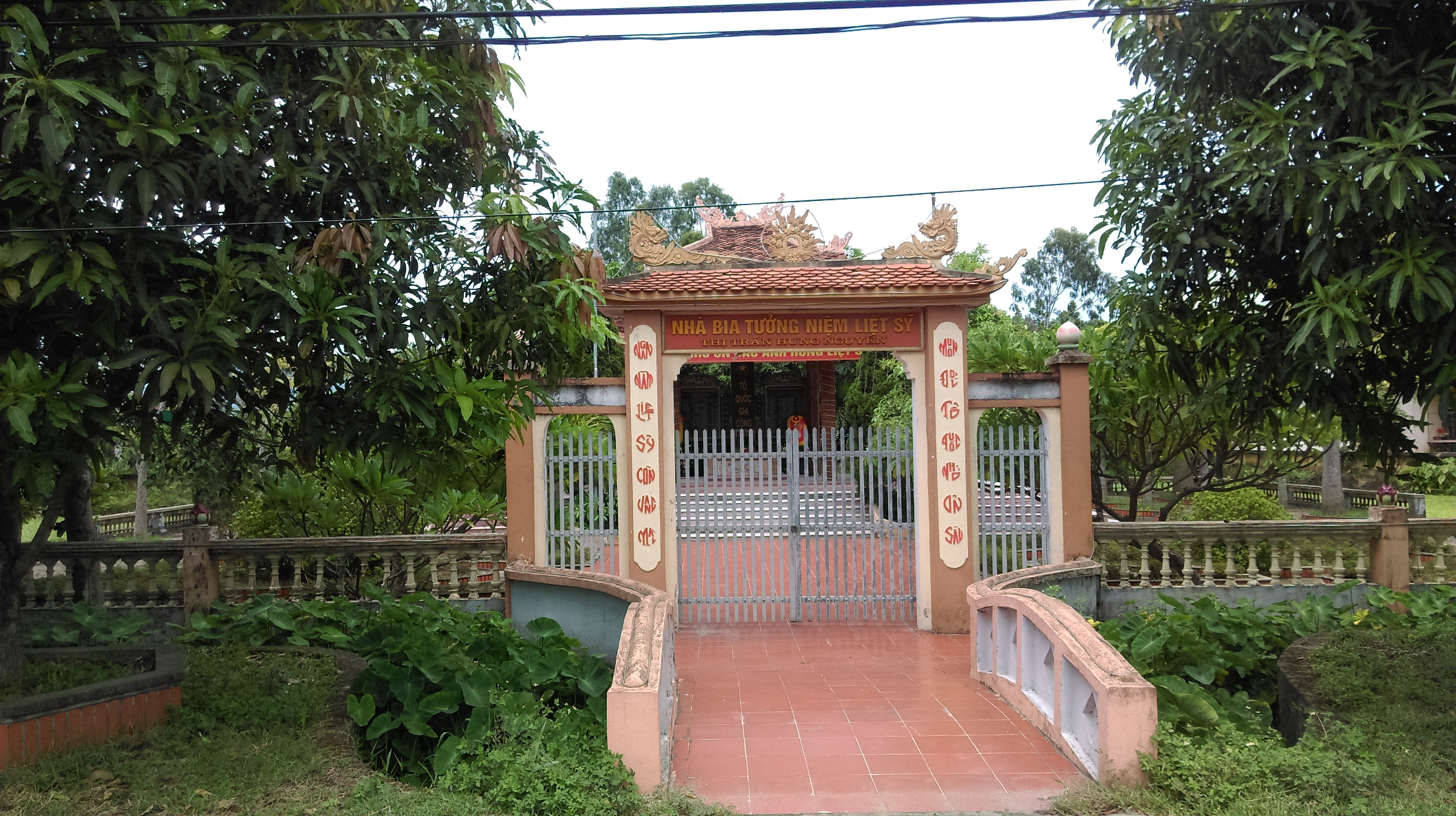 Nhà bia Tưởng niệm Liệt sĩ thị trấn Hưng Nguyên, Hưng Nguyên, Nghệ An